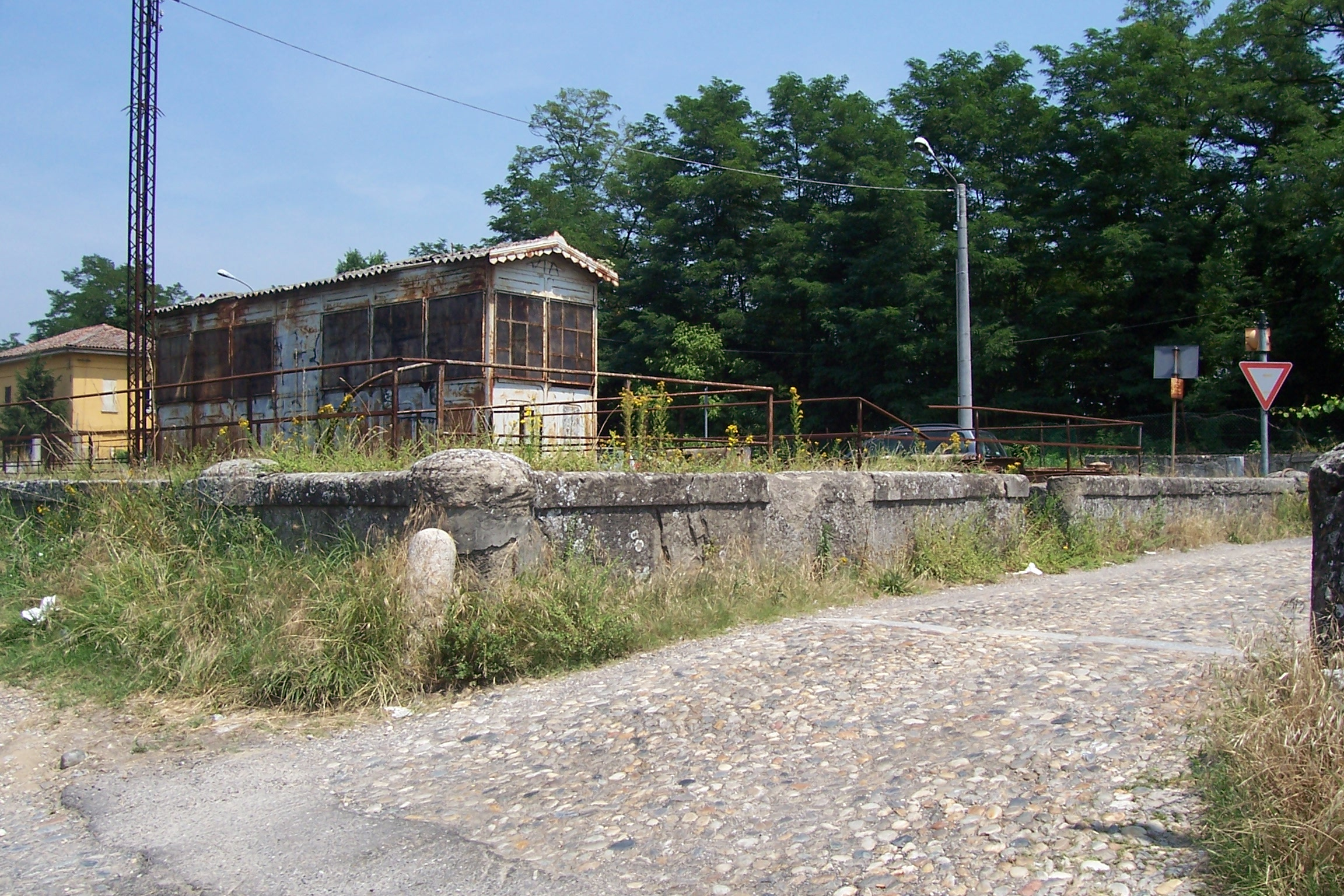 la Del Conca Cassinino ( Cascina Rizza ) ( PV), l' acciottolato originale